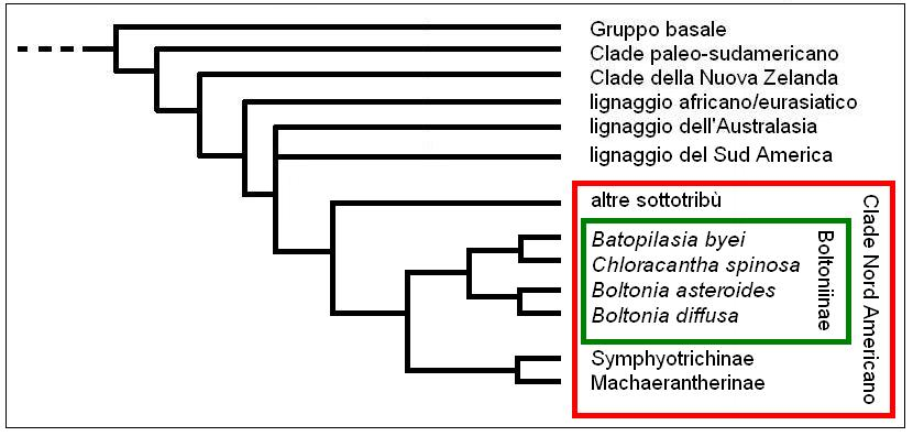 Boltoniinae - Cladogramma della sottotribù